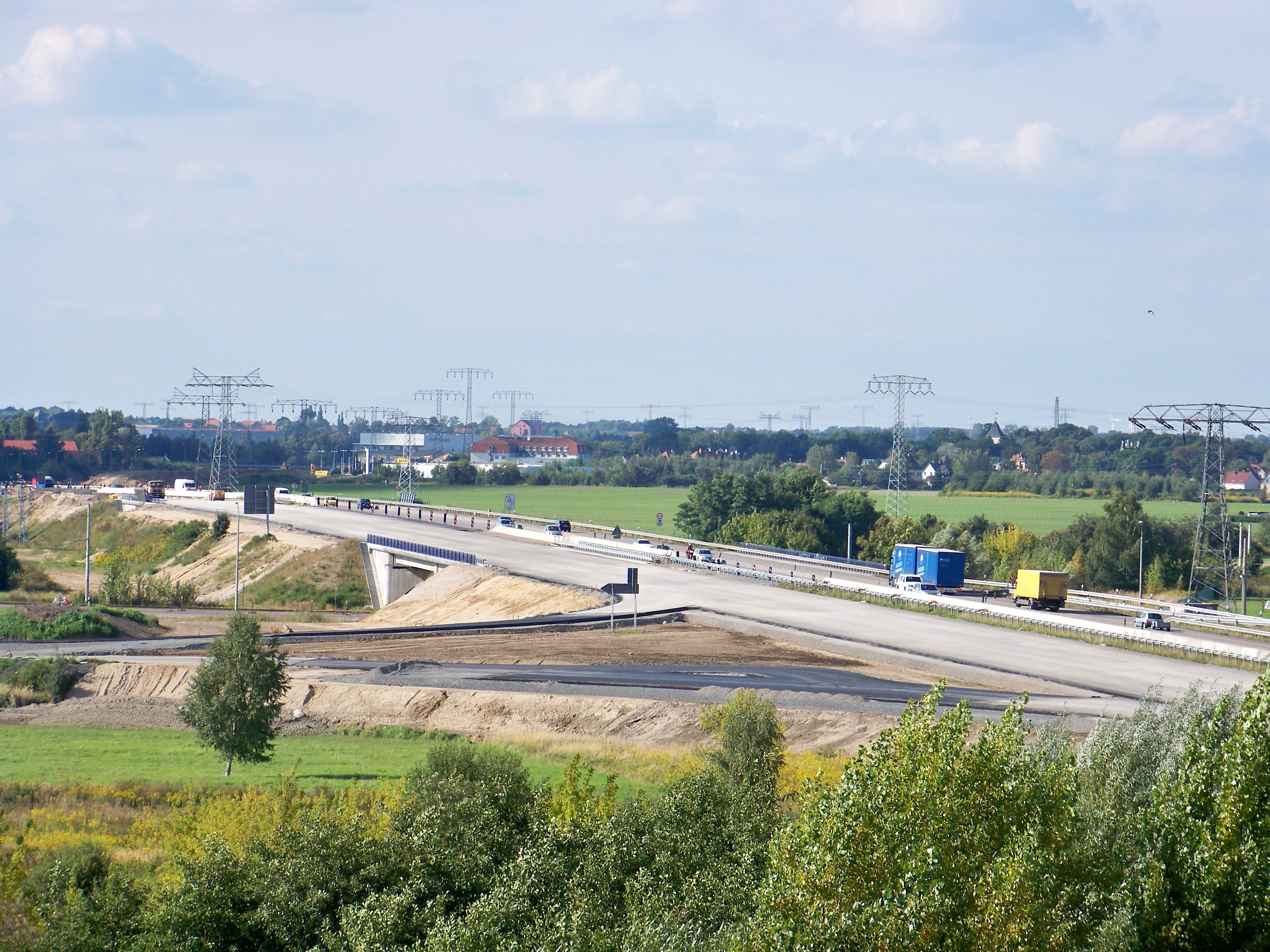 Anschlussstelle Leipzig-Nordost (Bundesstraße 87 → Taucha, Eilenburg, Torgau) der Autobahn 14 in Taucha während Baumaßnahmen